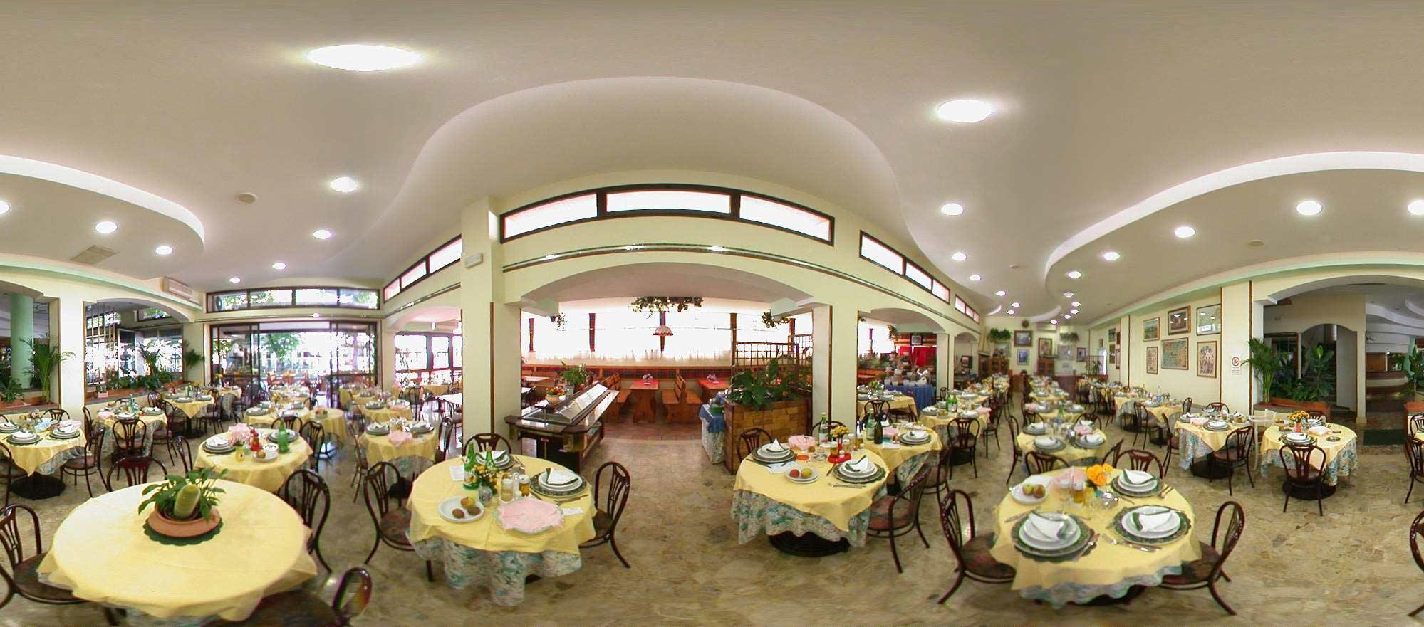 La Sala Ristorante del Liverpool Hotel Rimini All Inclusive, in Viale Bergamo, 8 a Rivazzurra di Rimini.